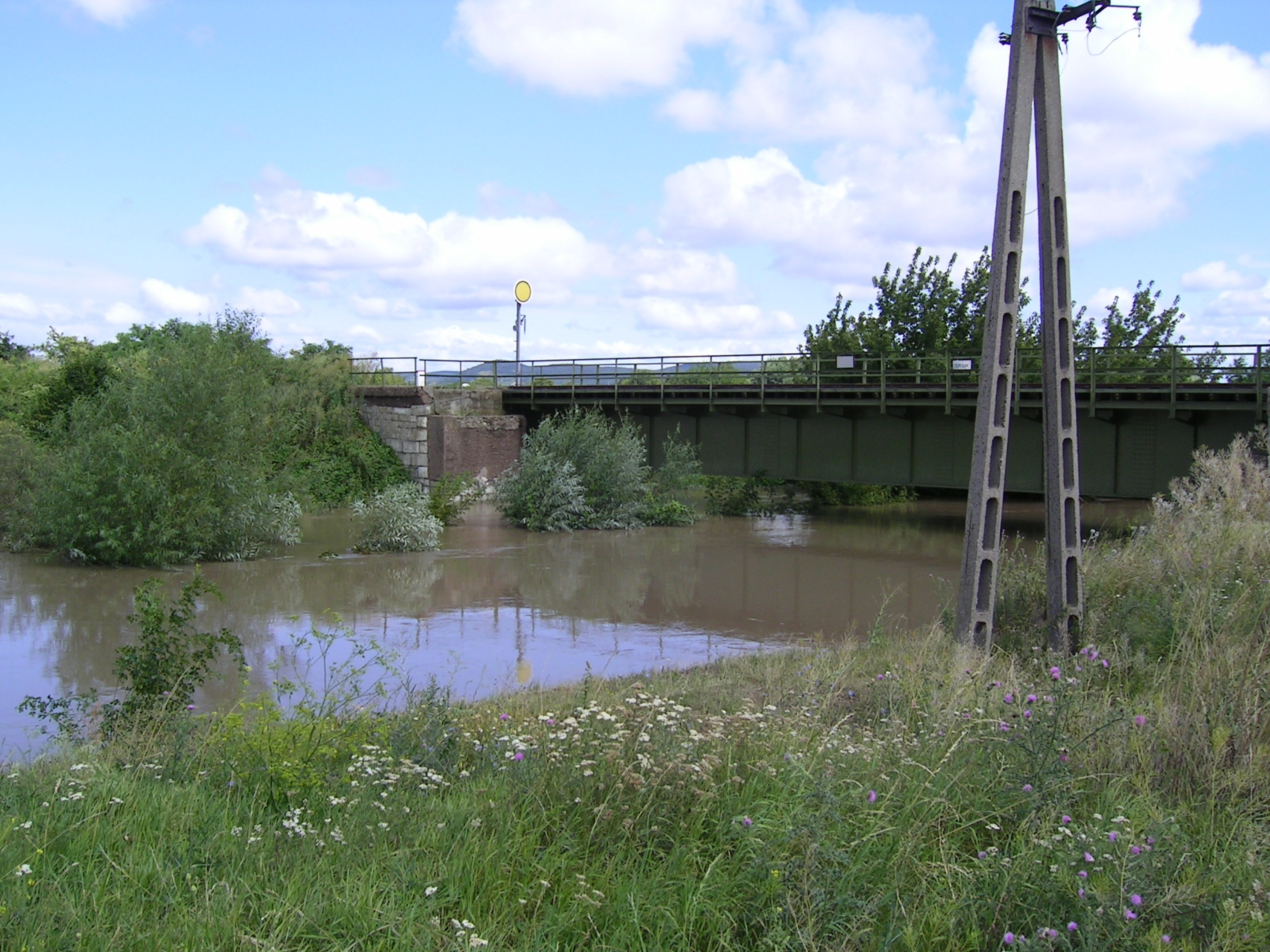 Határkeresztező vasúti híd a Ronyva árapasztó csatorna torkolatánál